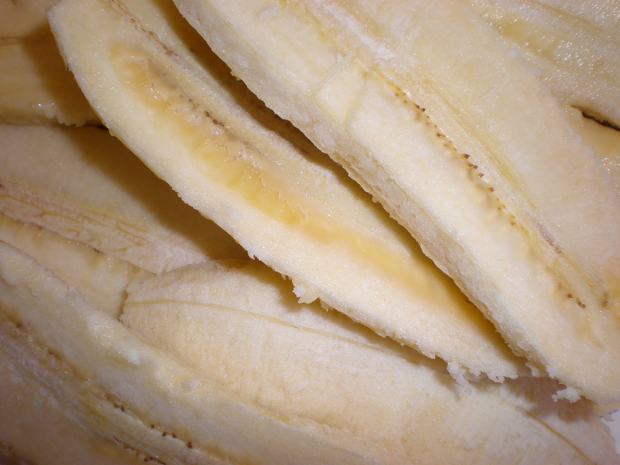 Sliced saba bananas